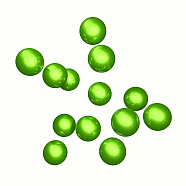 3D demonstratie van metaball. Eigen ontwerp, met programma Strata 3D 3.0.2 (gratis versie die ook gebruikt mag worden, geen demo-versie)